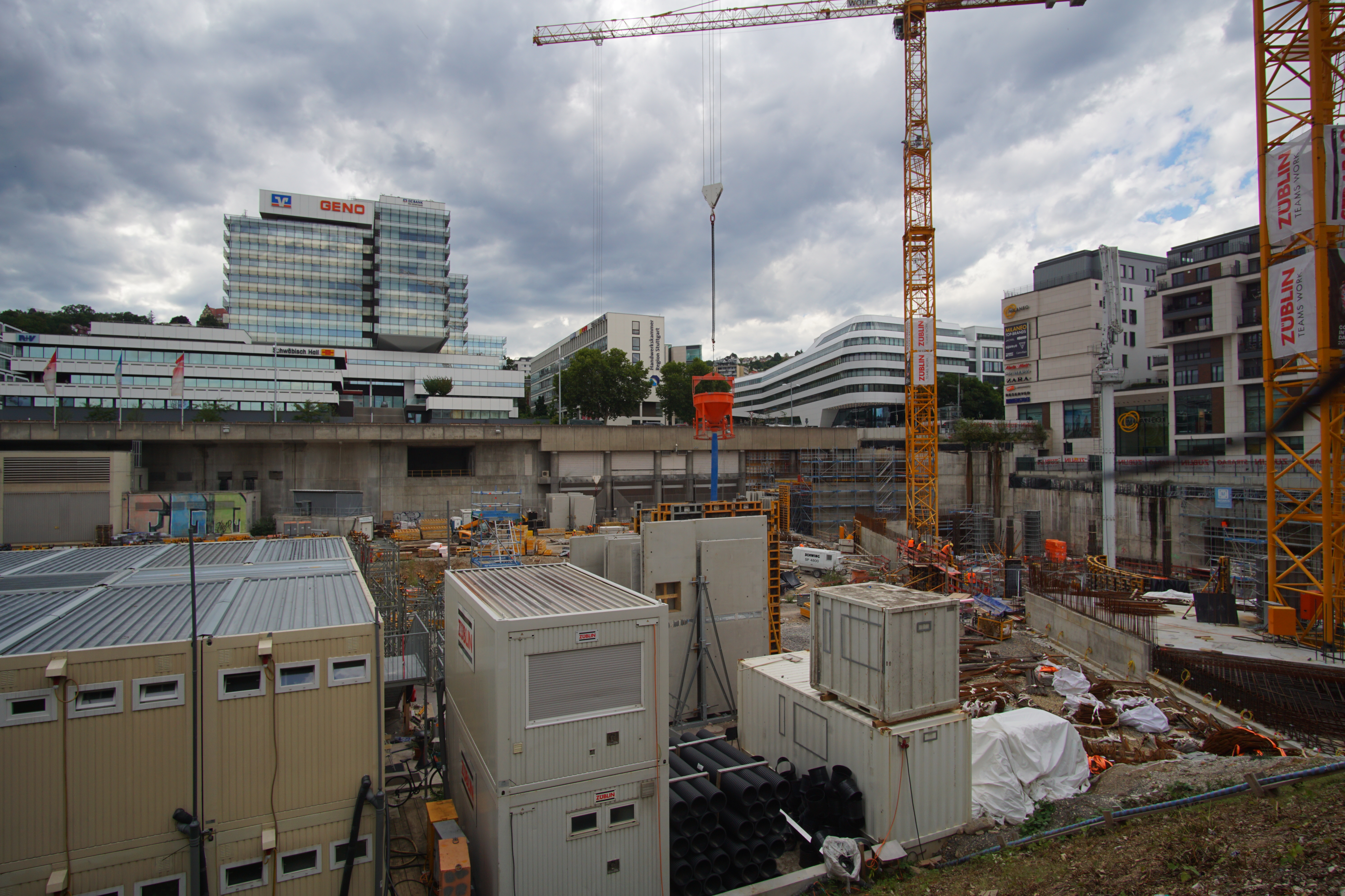 Europaviertel Stuttgart